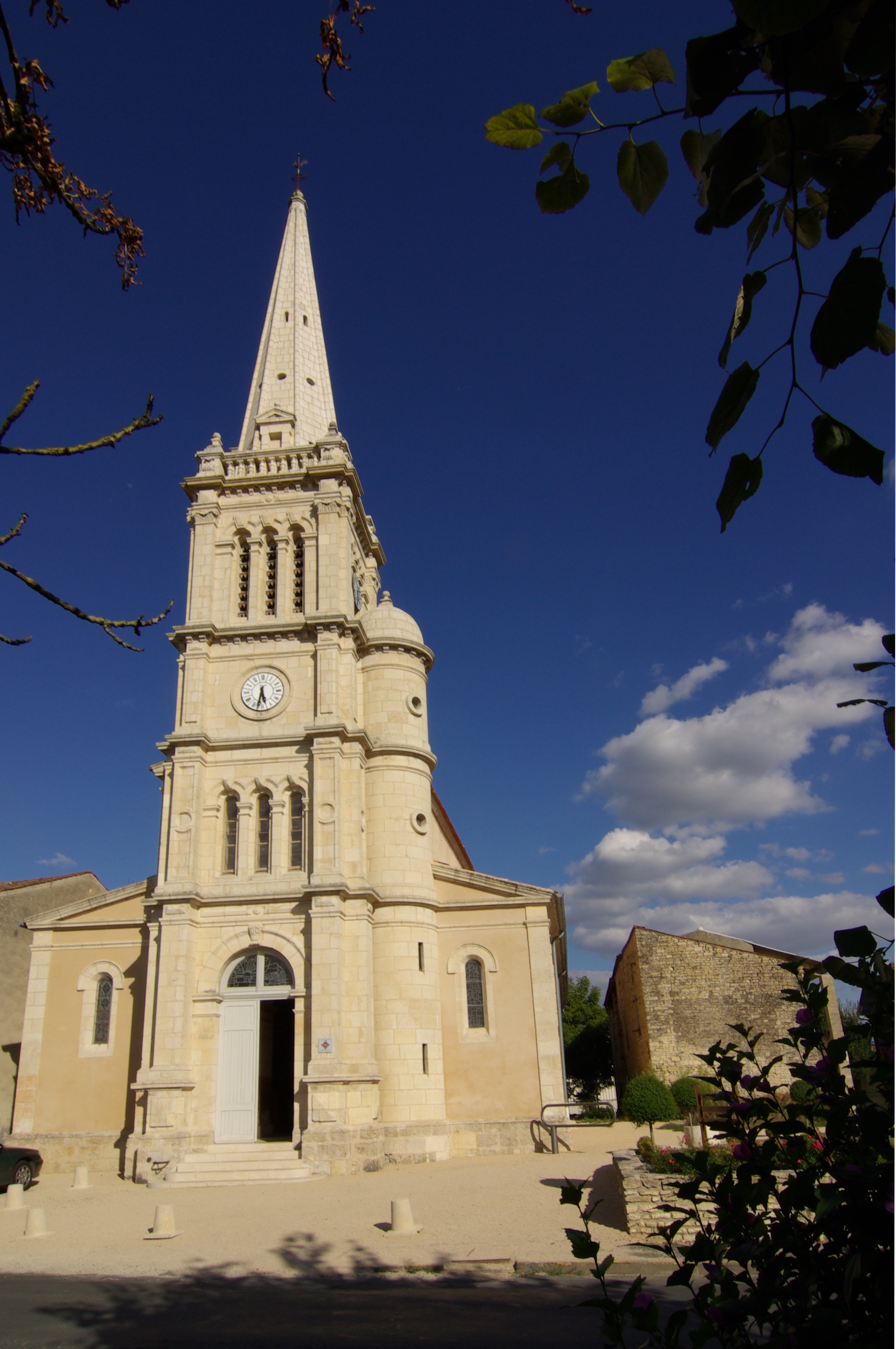 Église Saint-Guy de Damvix (Inscrit) .